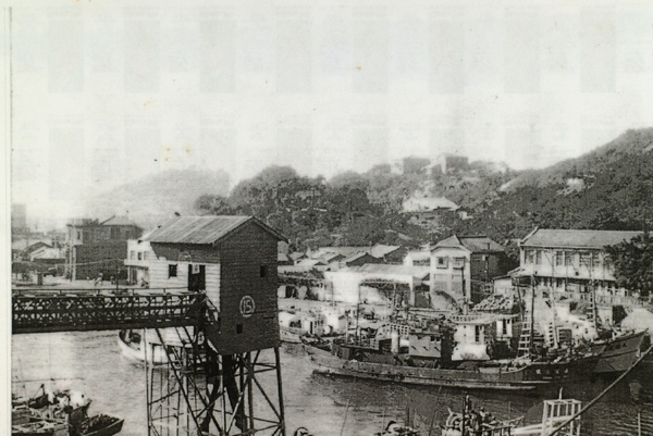 中文（台灣）: 鼓山輪渡站舊照